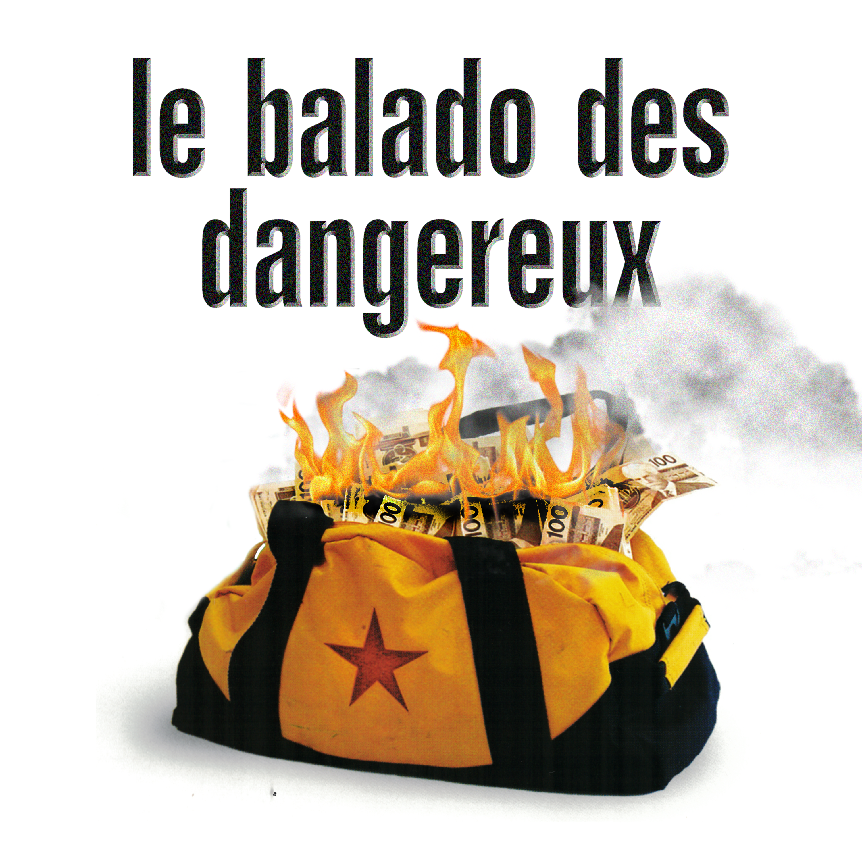 Cette photo représente le logo du podcast "Le balado des dangereux".